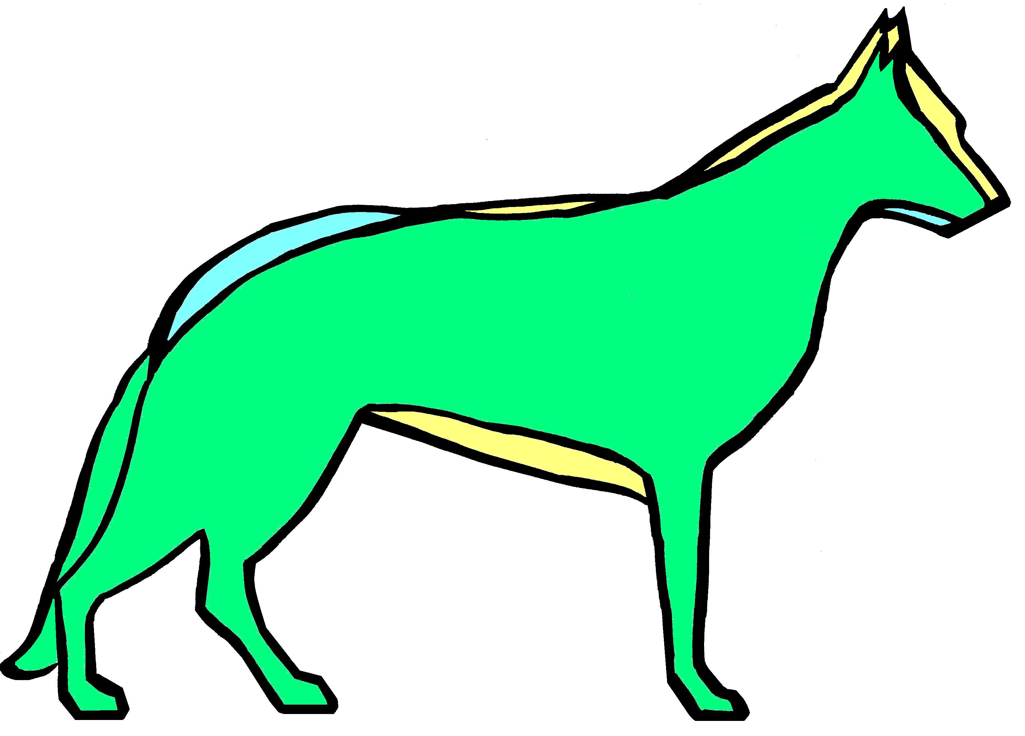 Erscheinungsbild des Deutschen Schäferhundes - früher (blau) und heute (gelb)